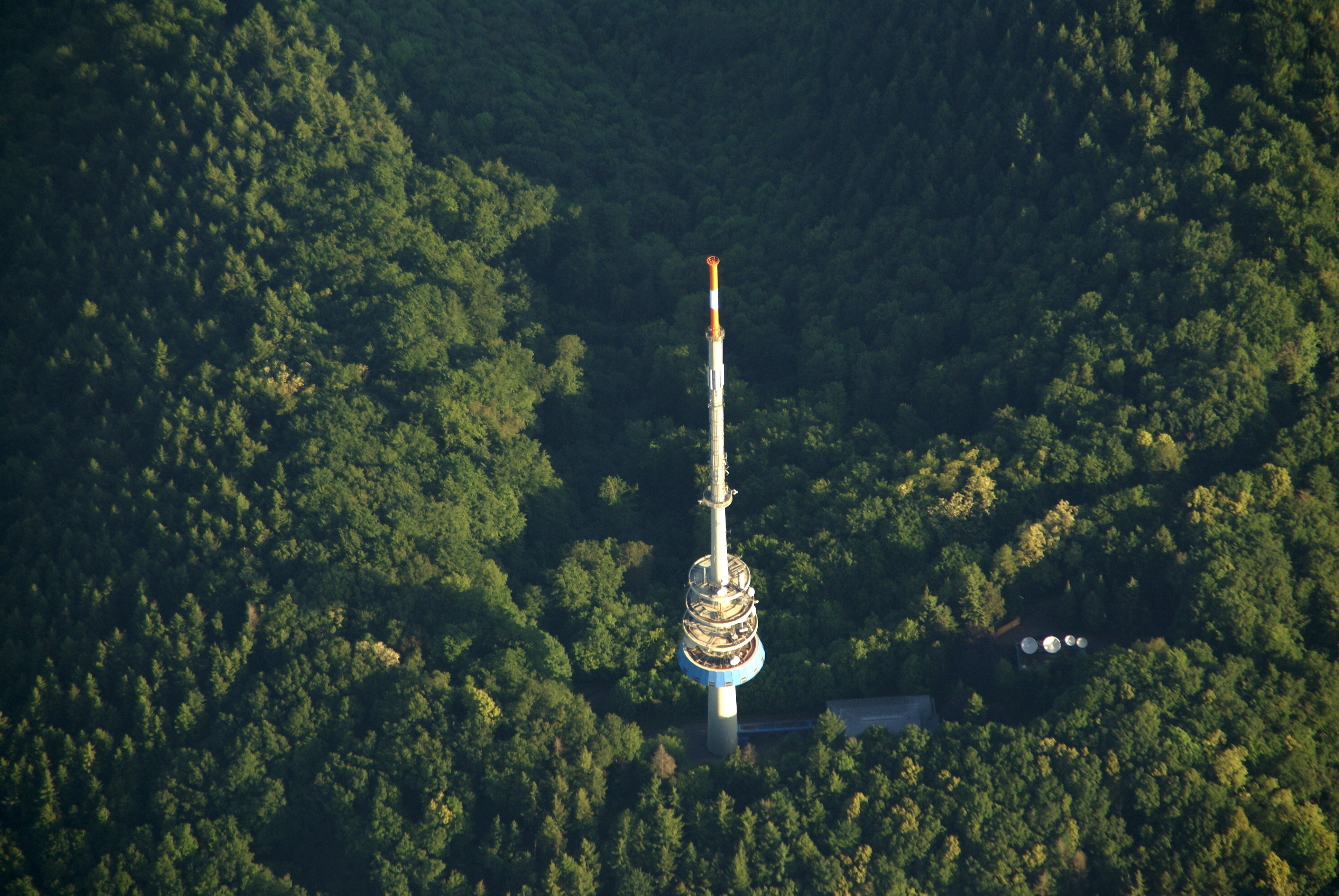 Luftbild vom Fernmeldeturm auf dem Totenkopf im Kaiserstuhl